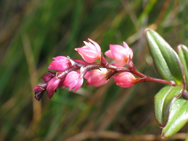 Epidendrum montigenum @ Roraima-Tepui, Venezuela